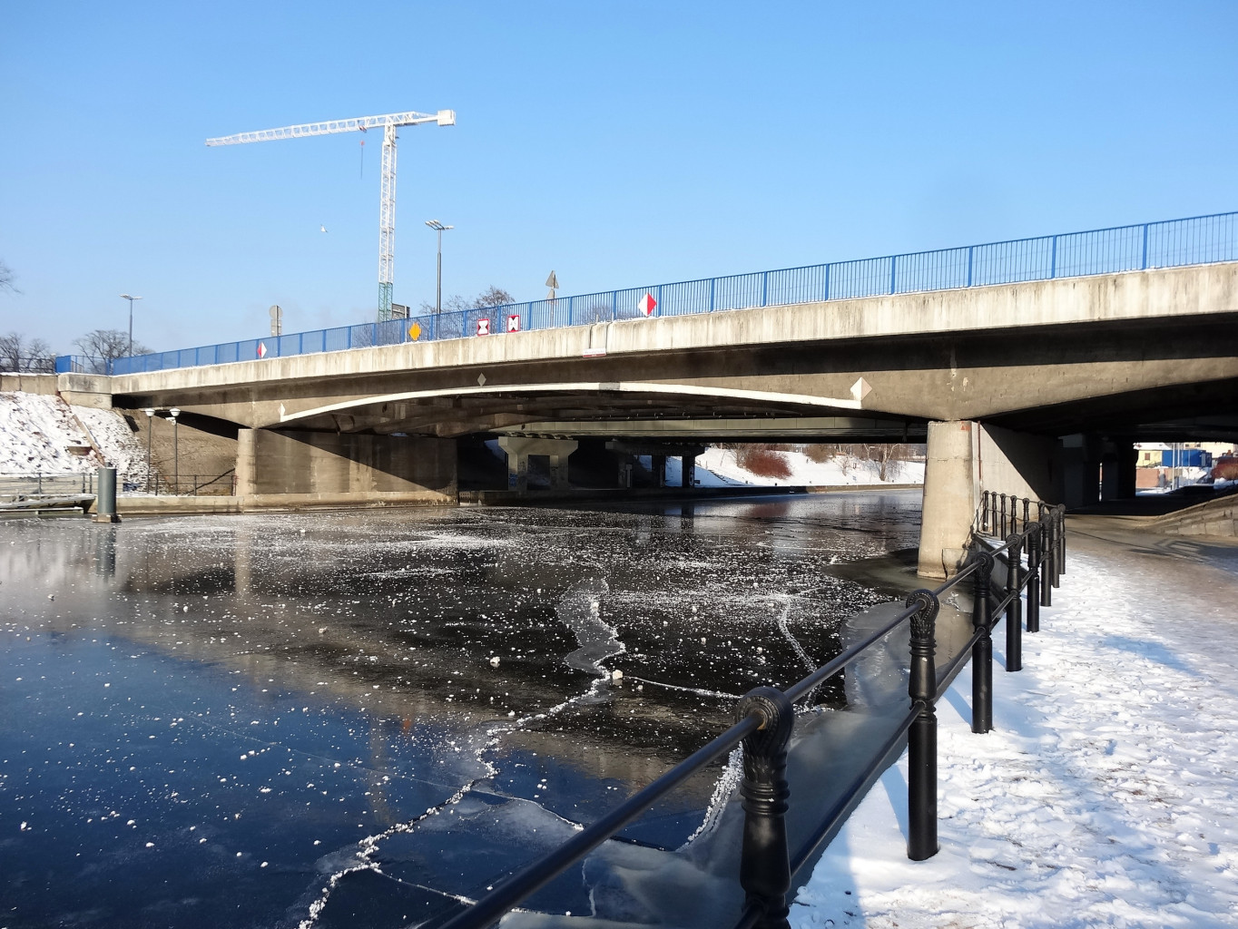 Mosty Solidarności nad Brdą w Bydgoszczy